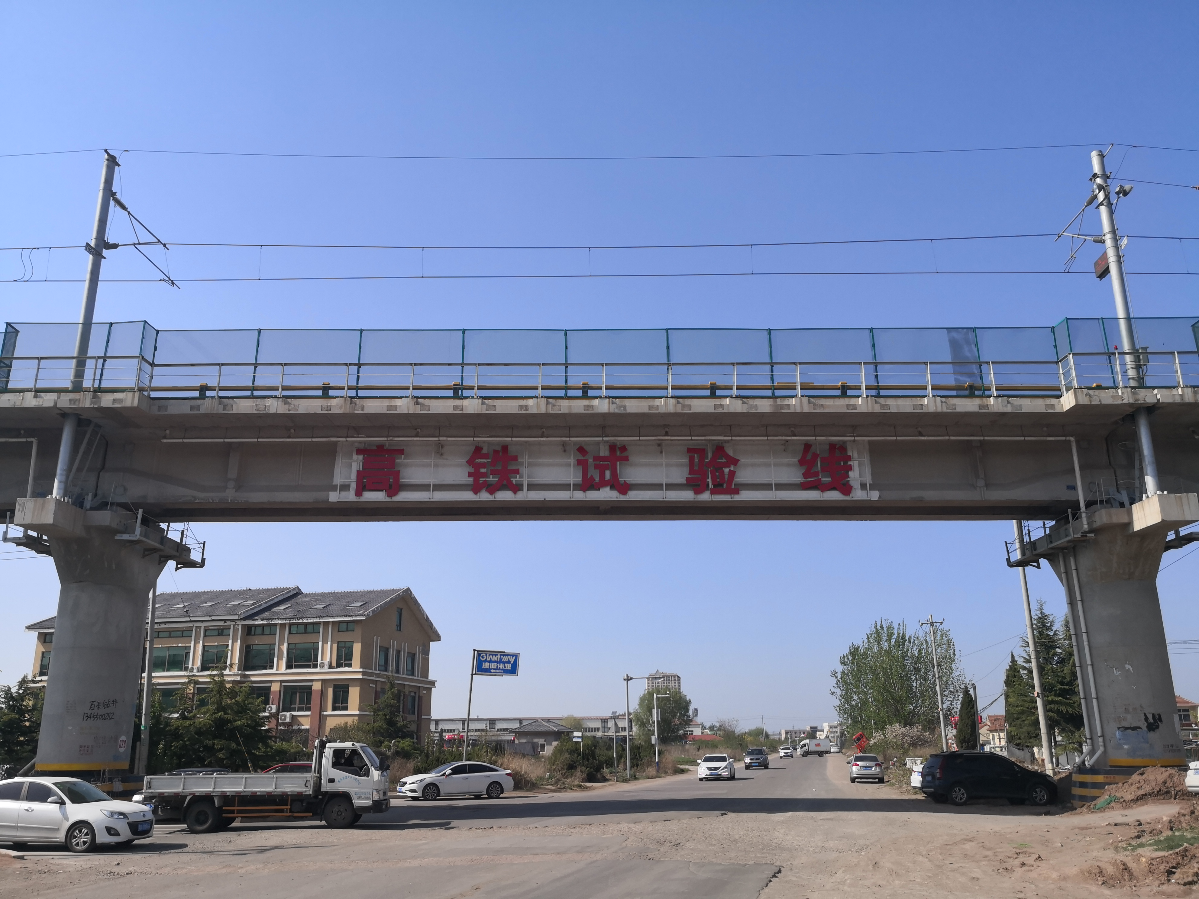 中车青岛四方机车车辆股份有限公司高速列车试验线